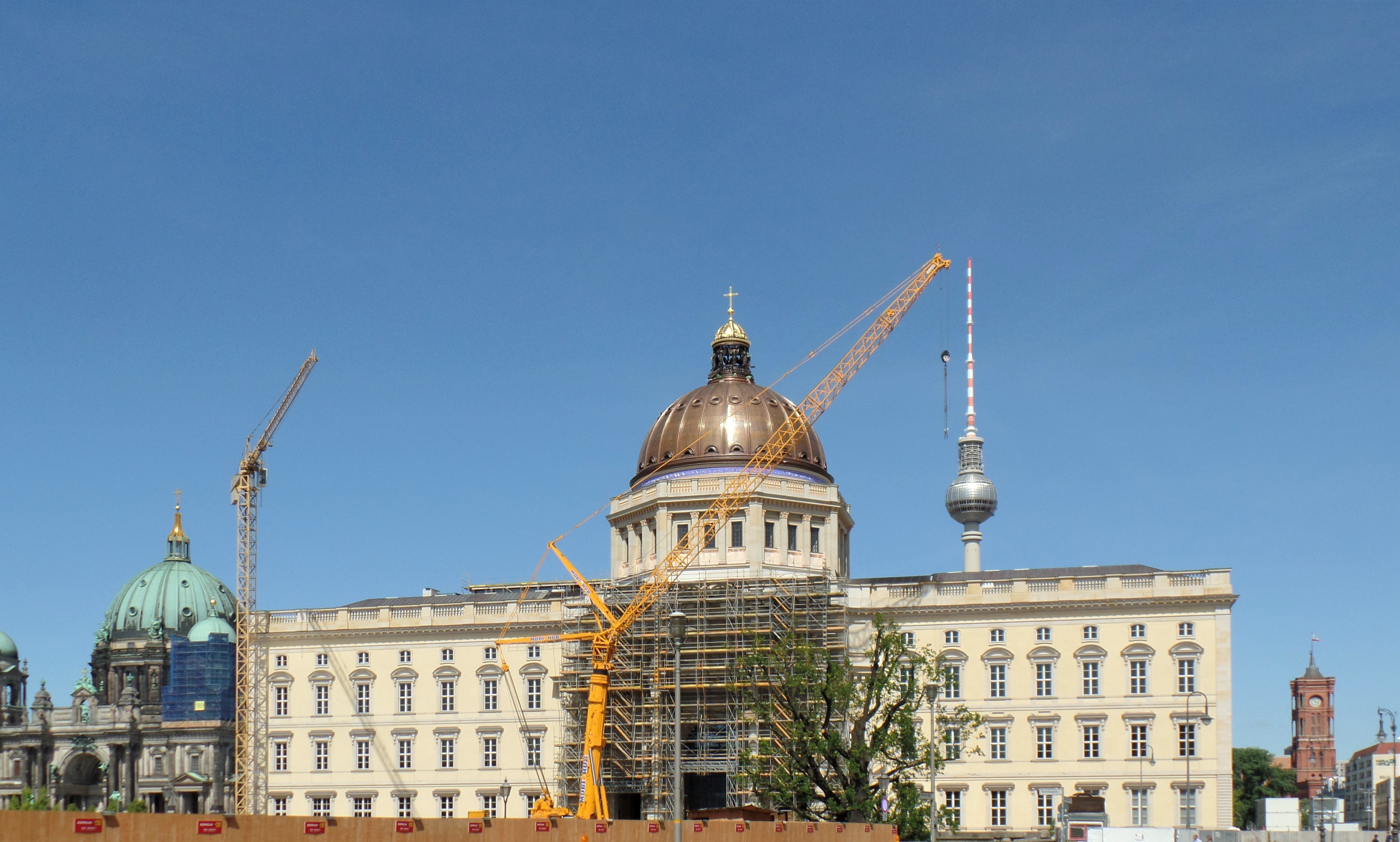 Schloss mit bekrönter Kuppel zwischen Dom und Rathaus